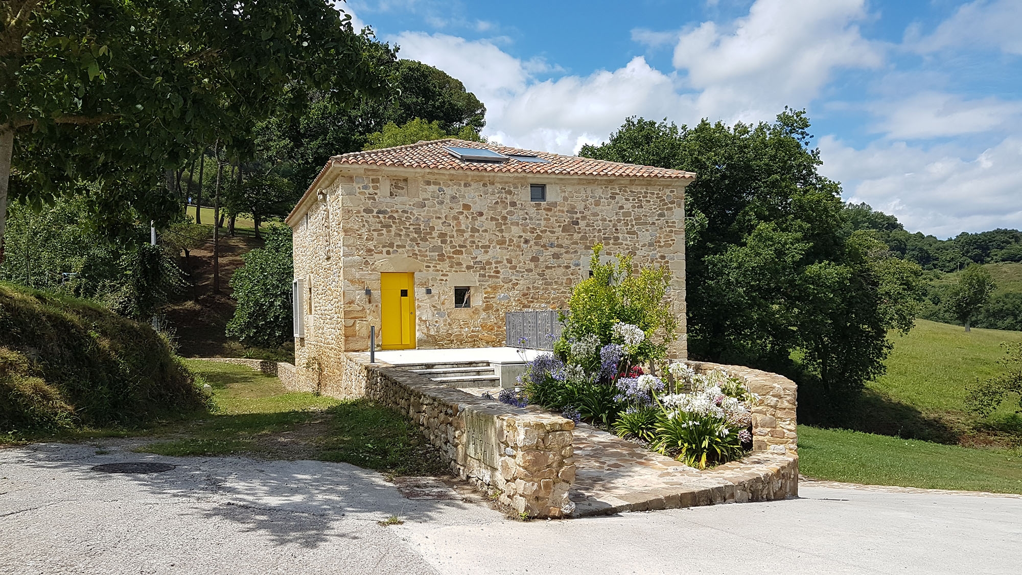 Casa Torre, solar de los Agustina en Carasa